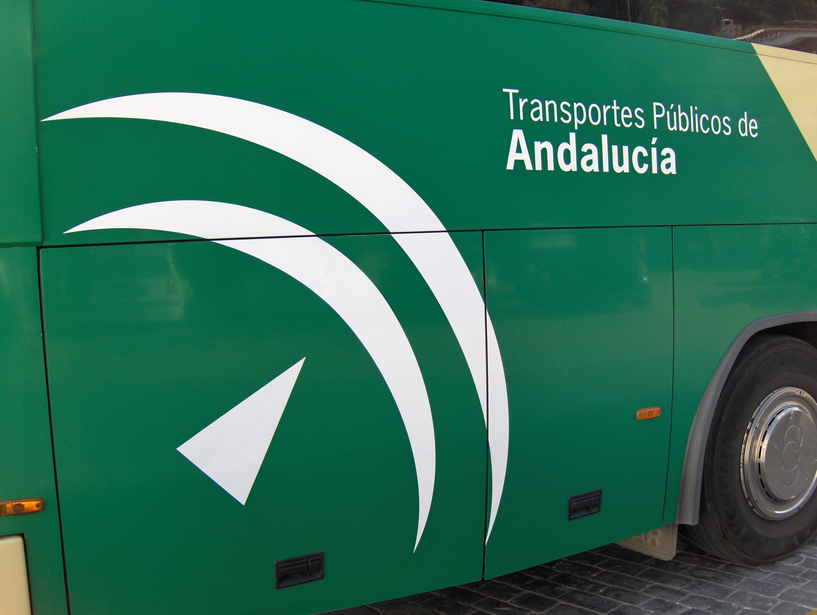 Logo de los Transpotes Públicos de Andalucía. Autobús en Moclinejo, Málaga, ESpaña.